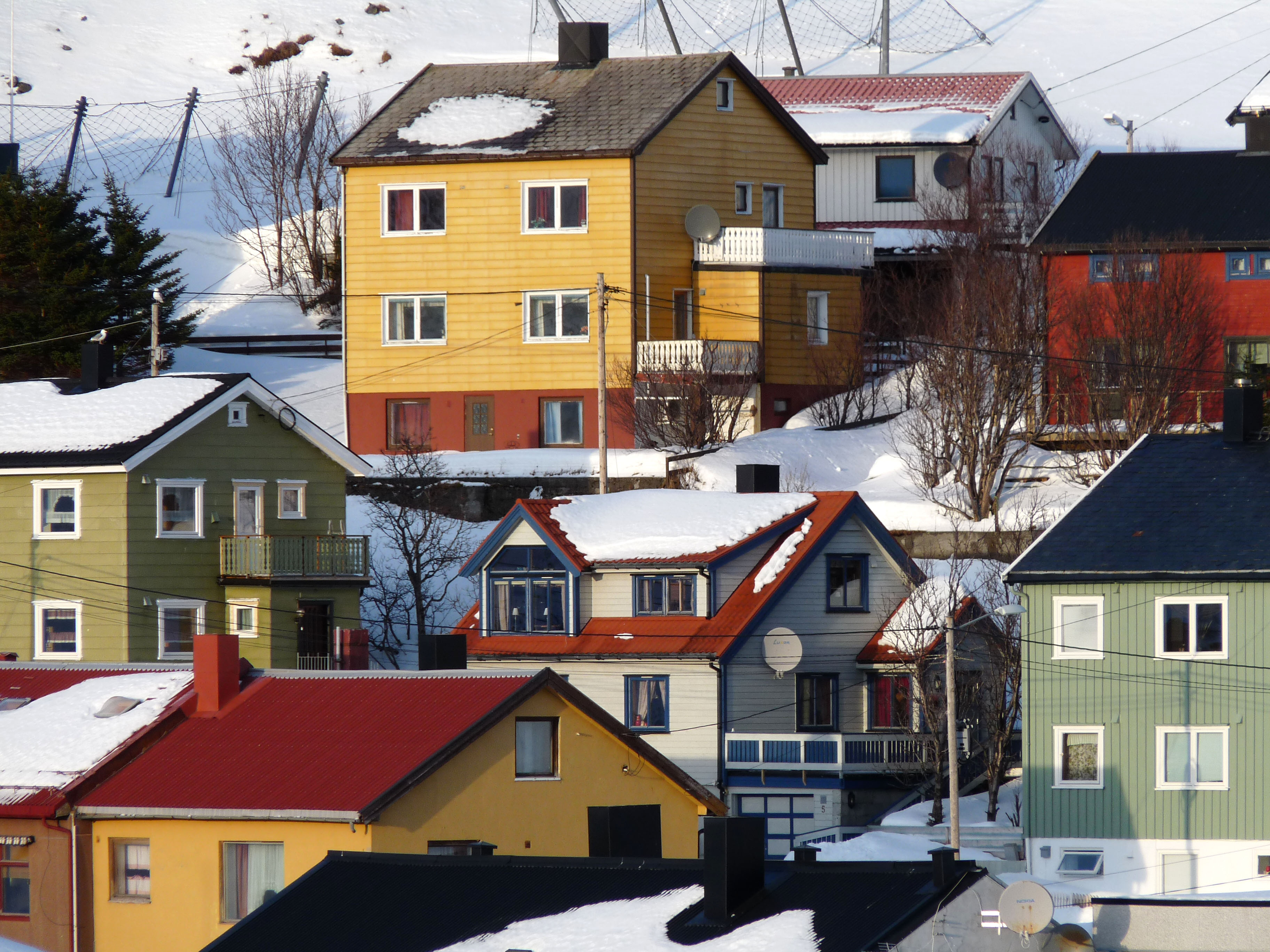 31 Honningsvåg